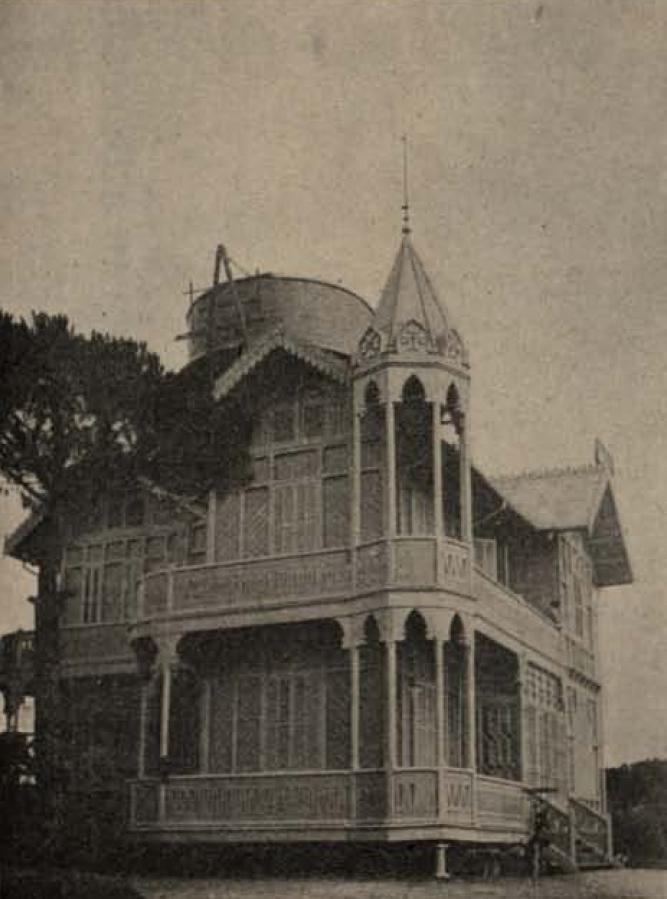 Casa desmuntamble Villa Lina del Comte de Bell-lloc